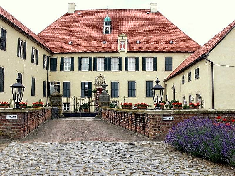 Das Haus Vornholz ist ein denkmalgeschütztes Profangebäude in Ostenfelde, einem Ortsteil von Ennigerloh im Kreis Warendorf (Nordrhein-Westfalen).